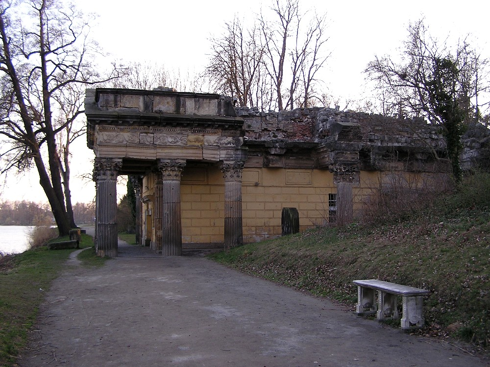 Die Schlossküche in Form einer Tempelruine im Neuen Garten Potsdam, Deutschland